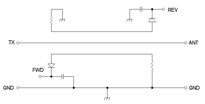 Исправлена ошибка в направлении прямой и отражённой волны.